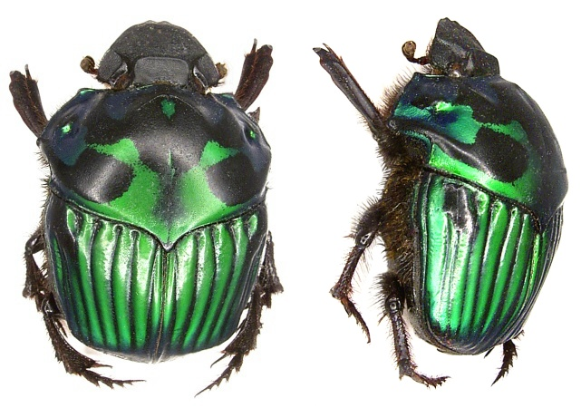 Familie: Scarabaeidae Grösse: 21-31 mm Verbreitung: Panama, Venezuela, Kolumbien Fundort: Peru, Salvacio leg. 1997; det. U.Schmidt Foto: U.Schmidt, 2006